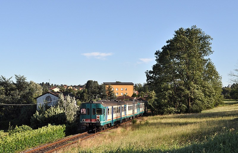 Treno in corsa sulla ferrovia Monza-Molteno-Lecco nei pressi di Renate (MB).